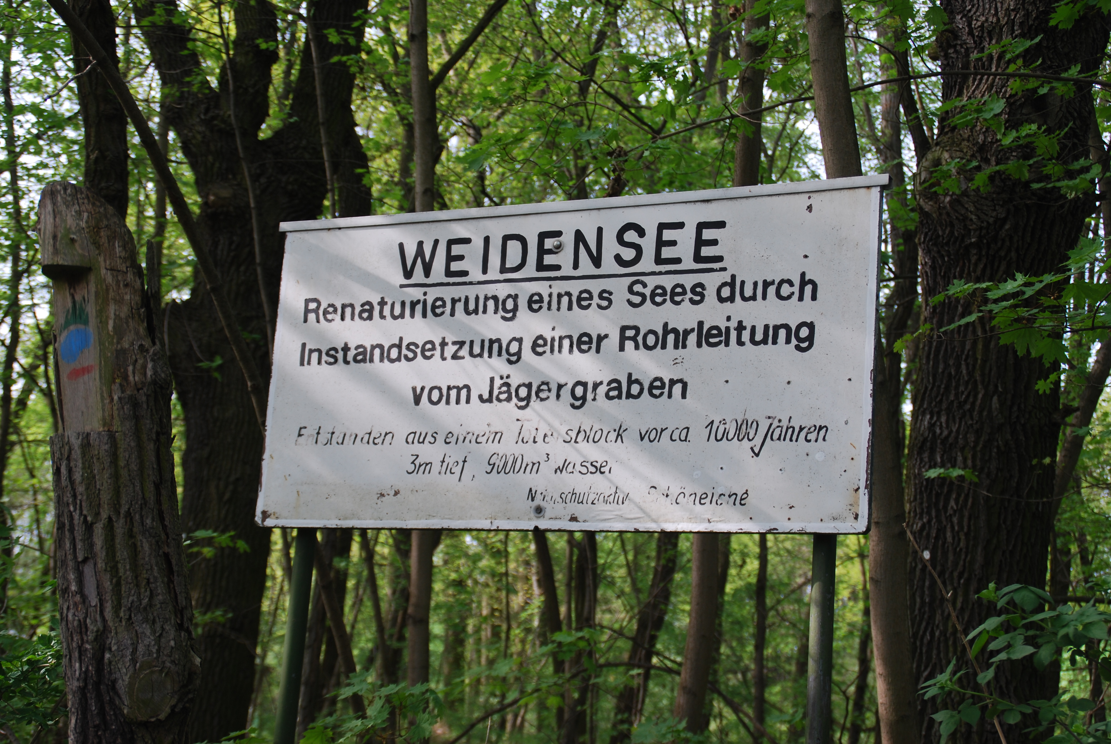 Weidensee Schöneiche: Hinweisschild